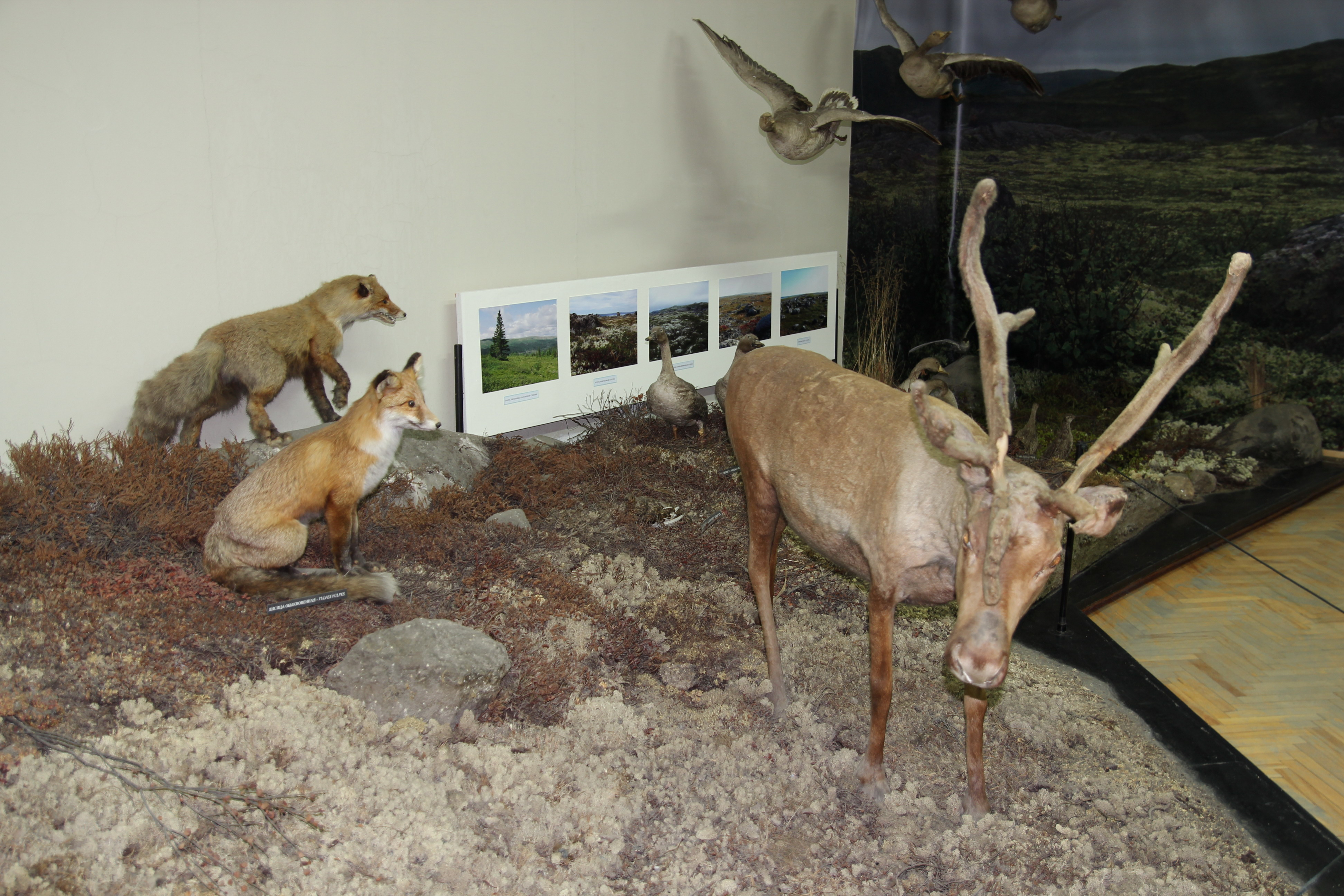 Тундра в Краеведческом музее Мурманска